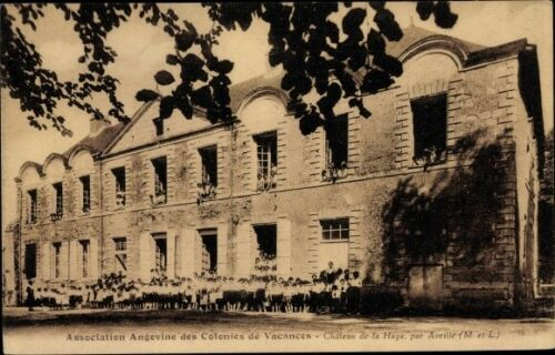 Façade du prieuré de la-Haye-aux-Bonshommes dans les années 1930, lorsqu'il accueillait une colonies de vacances de fillettes et d'adolescentes.